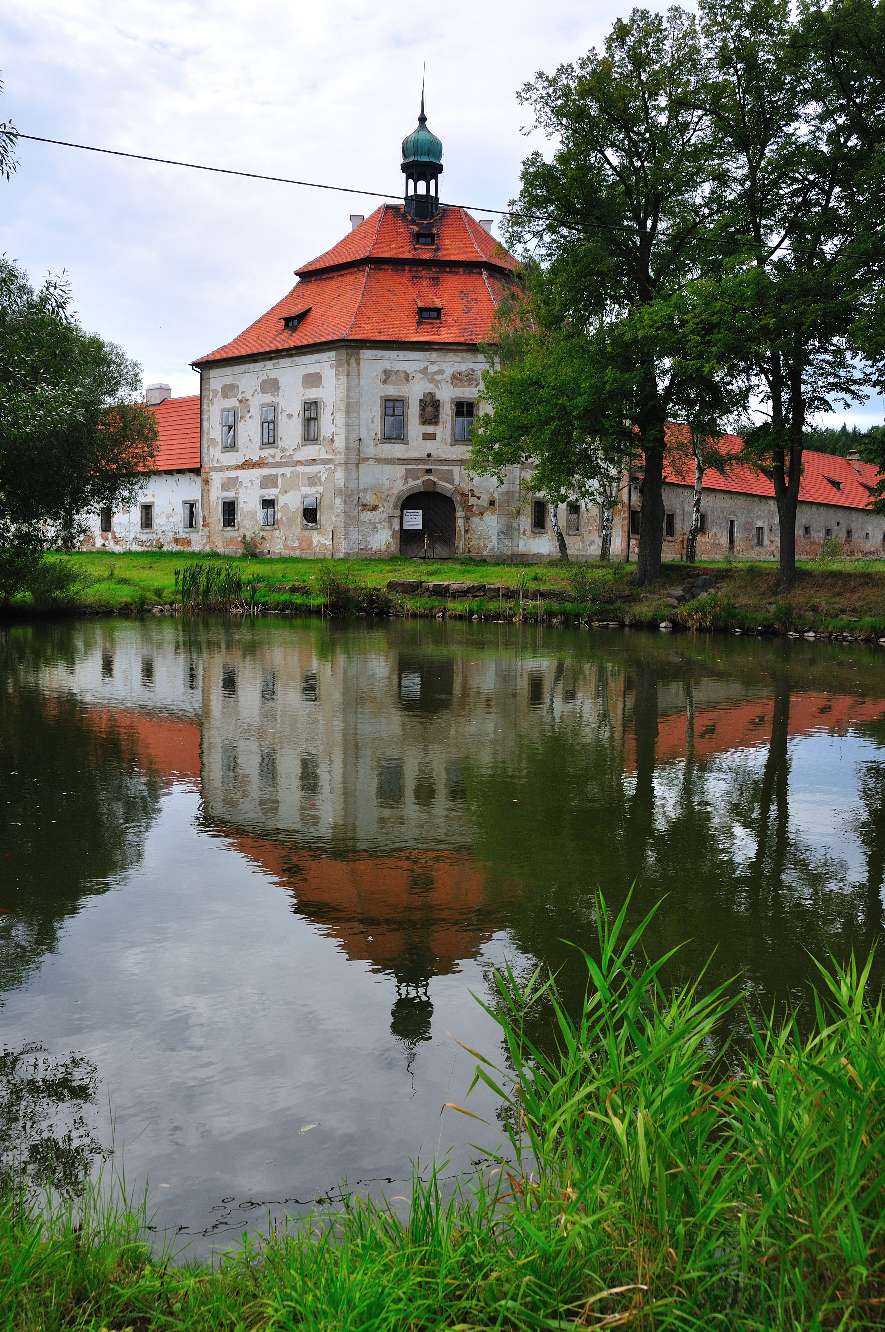 Postaven spolu s dvorem a špýcharem v letech 1730-1734 podle staršího návrhu J. Santiniho.